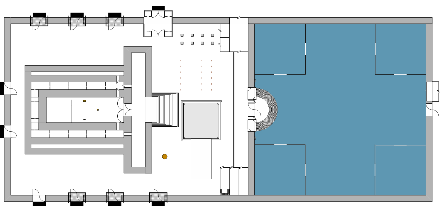 Plan du Temple d'Hérode. Coté est, en bleu, le Parvis des femmes (nashim), séparé de la Cour d'Israël par la porte de Nicanor et son escalier en demi-cercle de 15 marches. Une simple balustrade sépare l'étroite Cour d'Israël du Lieu Saint avec son immense autel de bronze. Coté ouest, le Débir (Saint des Saints).